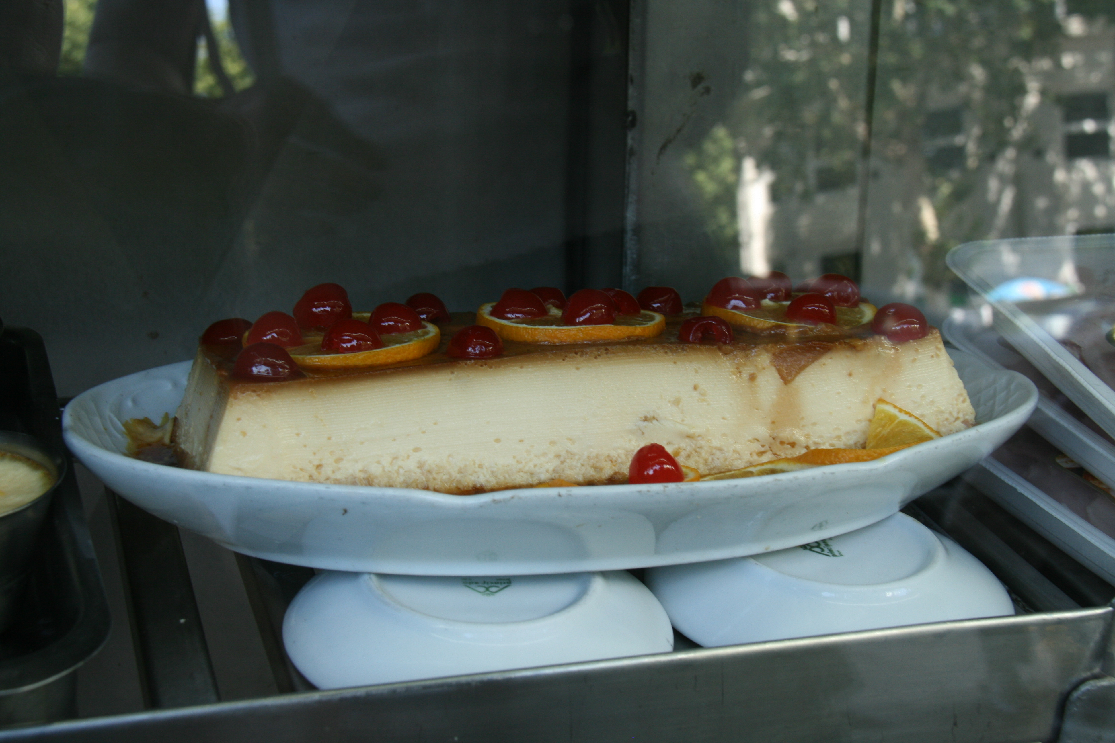 Pudding decorado con cerezas